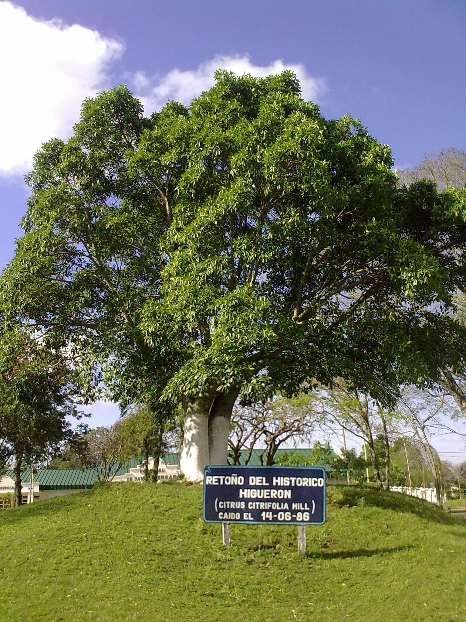 Pueblo de Yapeyú. En la Plaza San Martín, de Yapeyú, se encuentra el retoño del histórico higuerón, caído el 14 de junio de 1986, árbol que tenía 300 años aproximadamente y fue testigo de los juegos infantiles del Libertador.